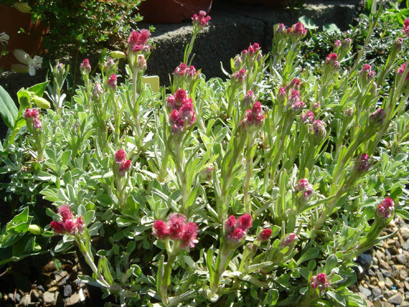 Antennaria dioica 'Rosea'